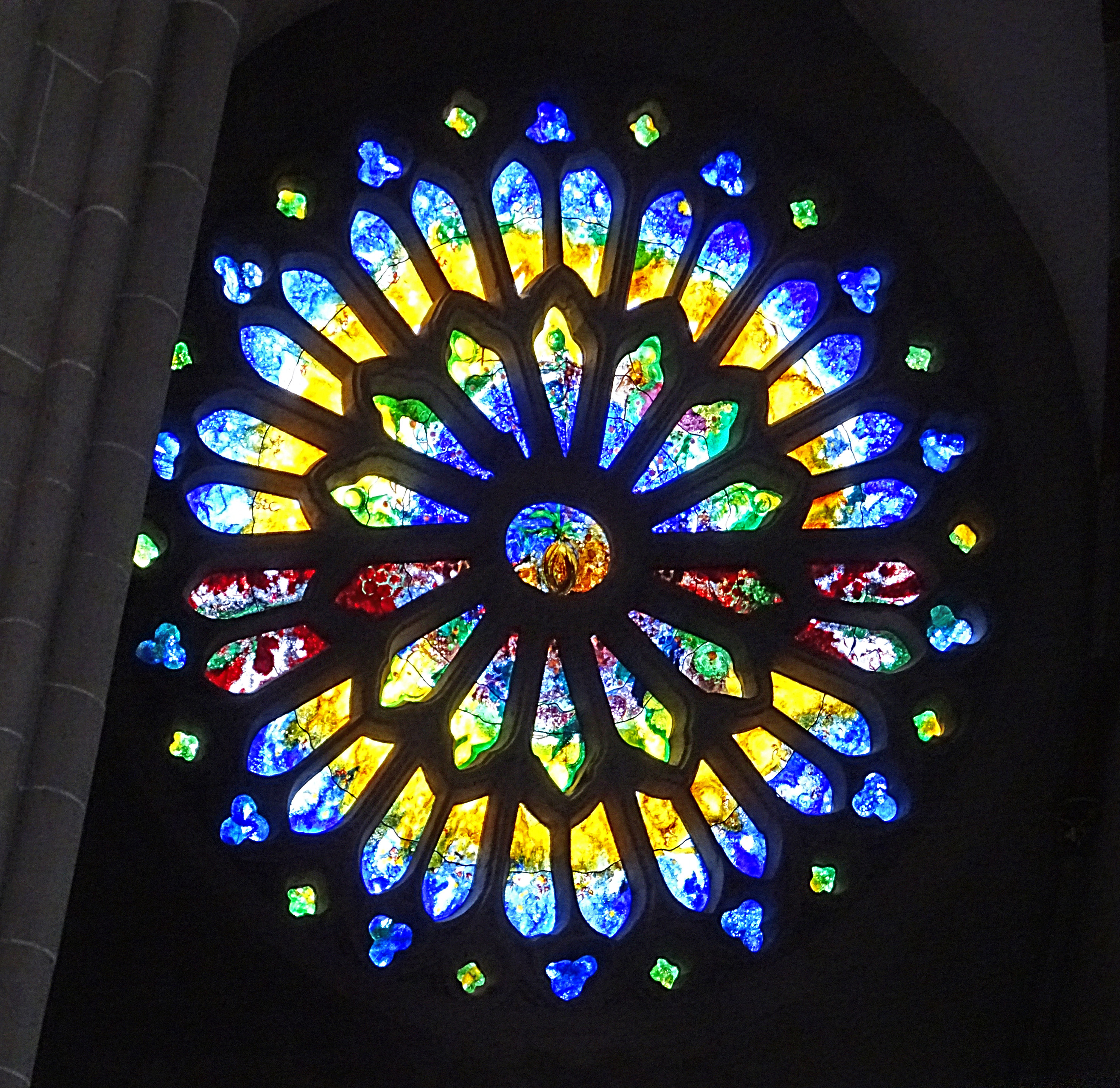 Großes Rosettenfenster "Saatkorn des Lebens" von Alexandra Lesch (Saarlouis, 2008) am Nordquerhaus der Divi-Blasii-Kirche (Mühlhausen, Thüringen)